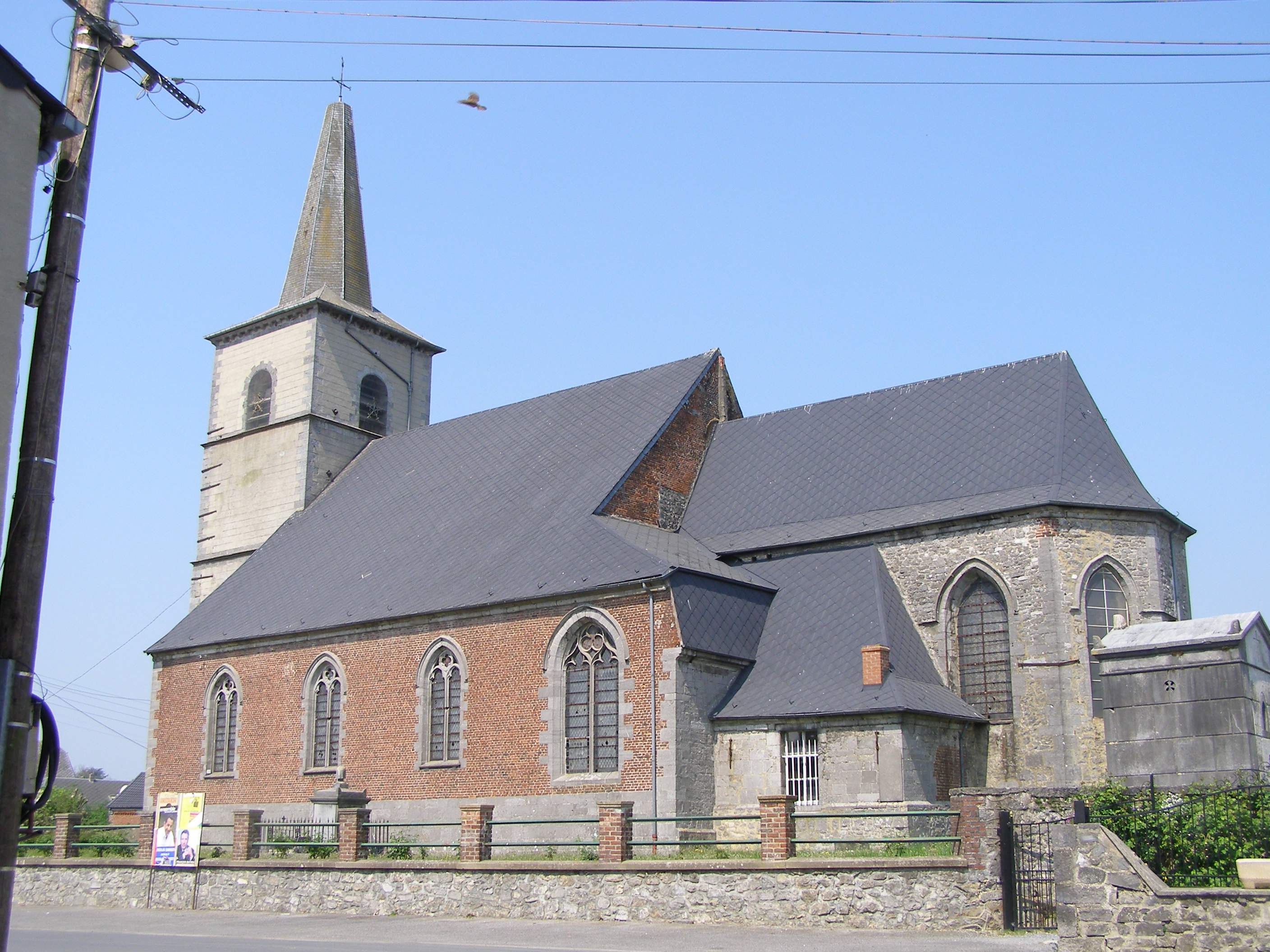 L'église.